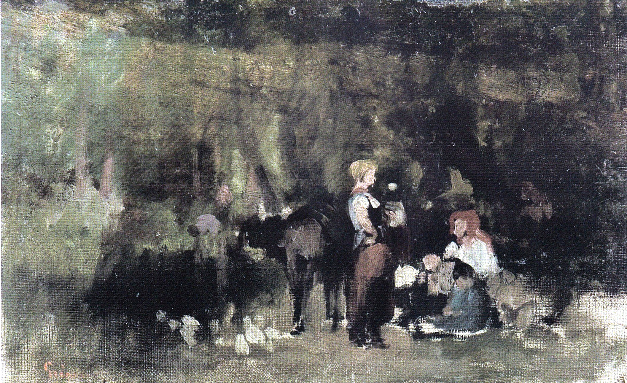 Studiu pentru La râu, ulei pe pânză lipită pe carton - Galeria de Artă Românească Modernă de la Muzeul Național de Artă al României.